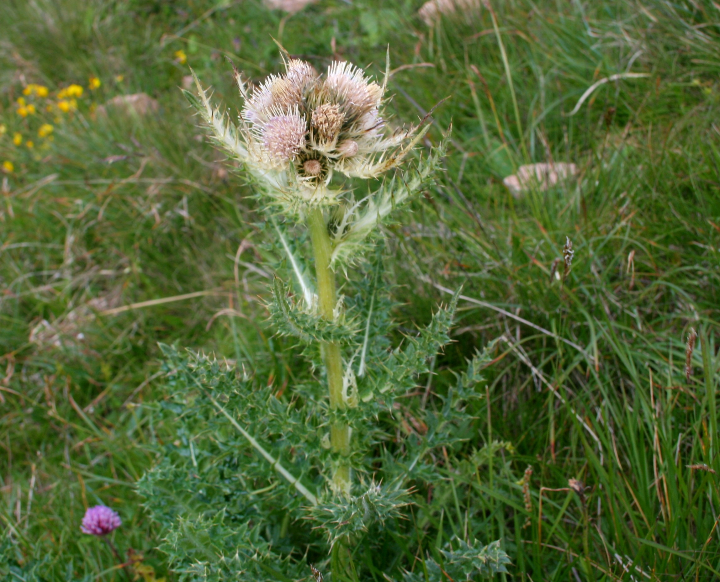 Cardo spinosissimo - Località: Cortina (BL), 1400 m s.l.m.